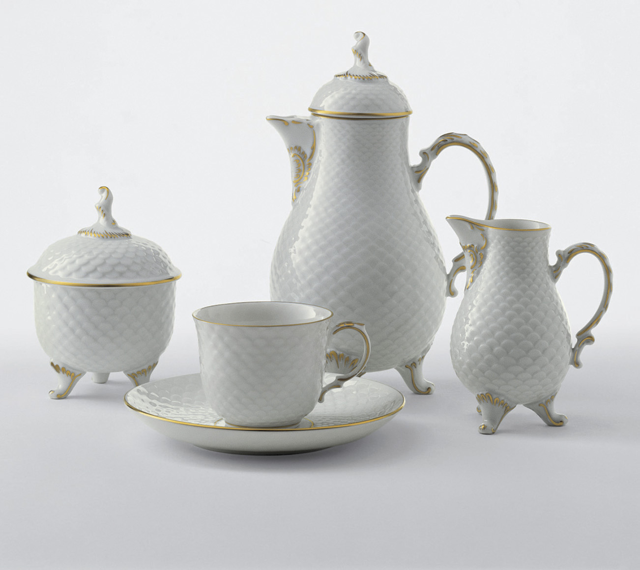 Porzellanmanufaktur Ludwigsburg GmbH, Scales Pattern Mocha Set (German: Schuppenmuster-Mokkaservice)